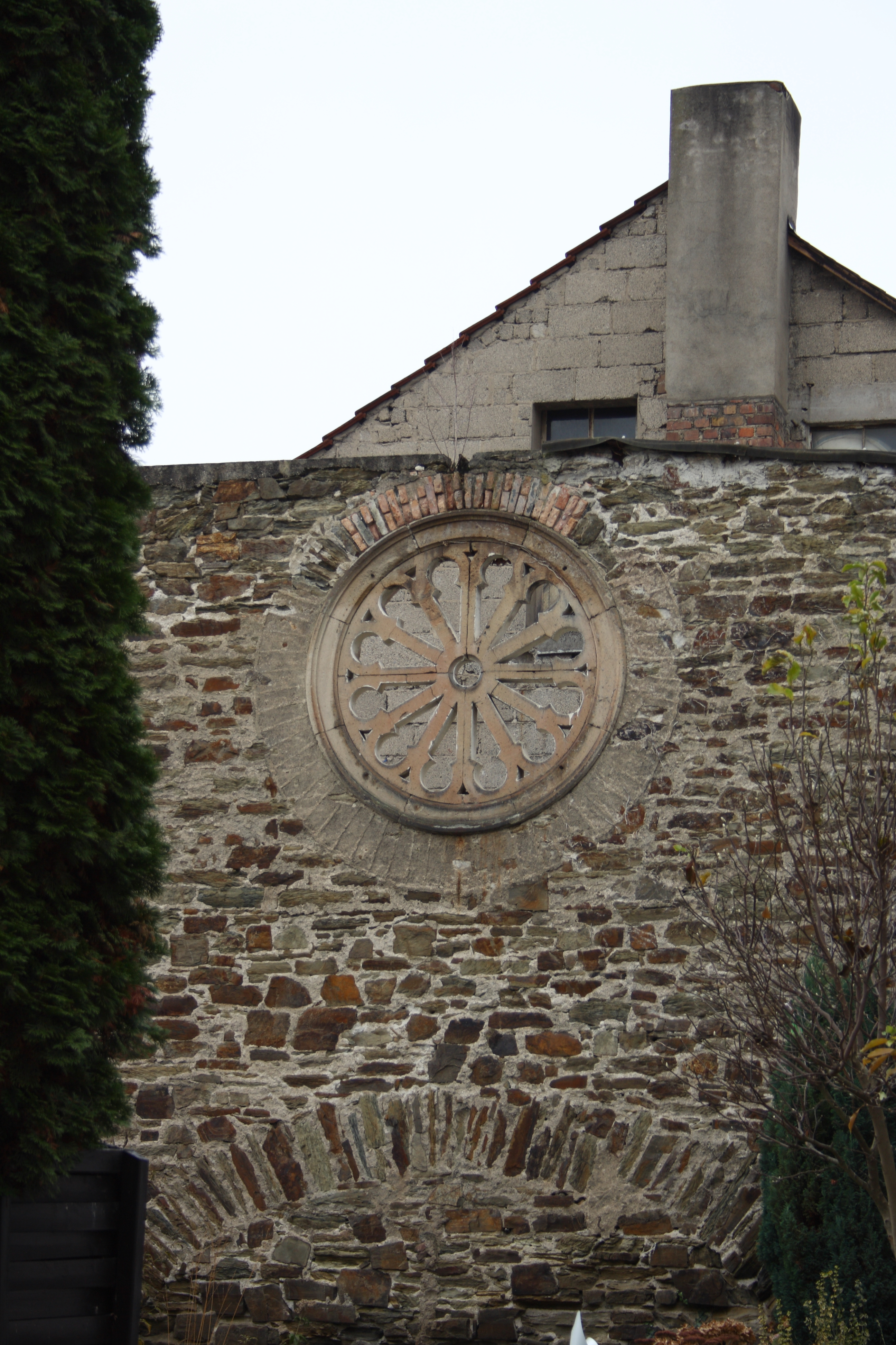 Reste der Synagoge in Vallendar im Landkreis Mayen-Koblenz (Rheinland-Pfalz), Eulerstraße 3, im Neubau zwei Bruchsteingeschosse der rückwärtigen Giebelwand erhalten